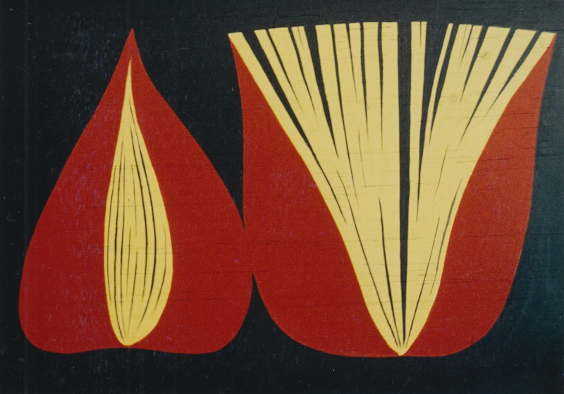 Peinture réalisée par l'artiste Achot Achot durant sa période évangélique.